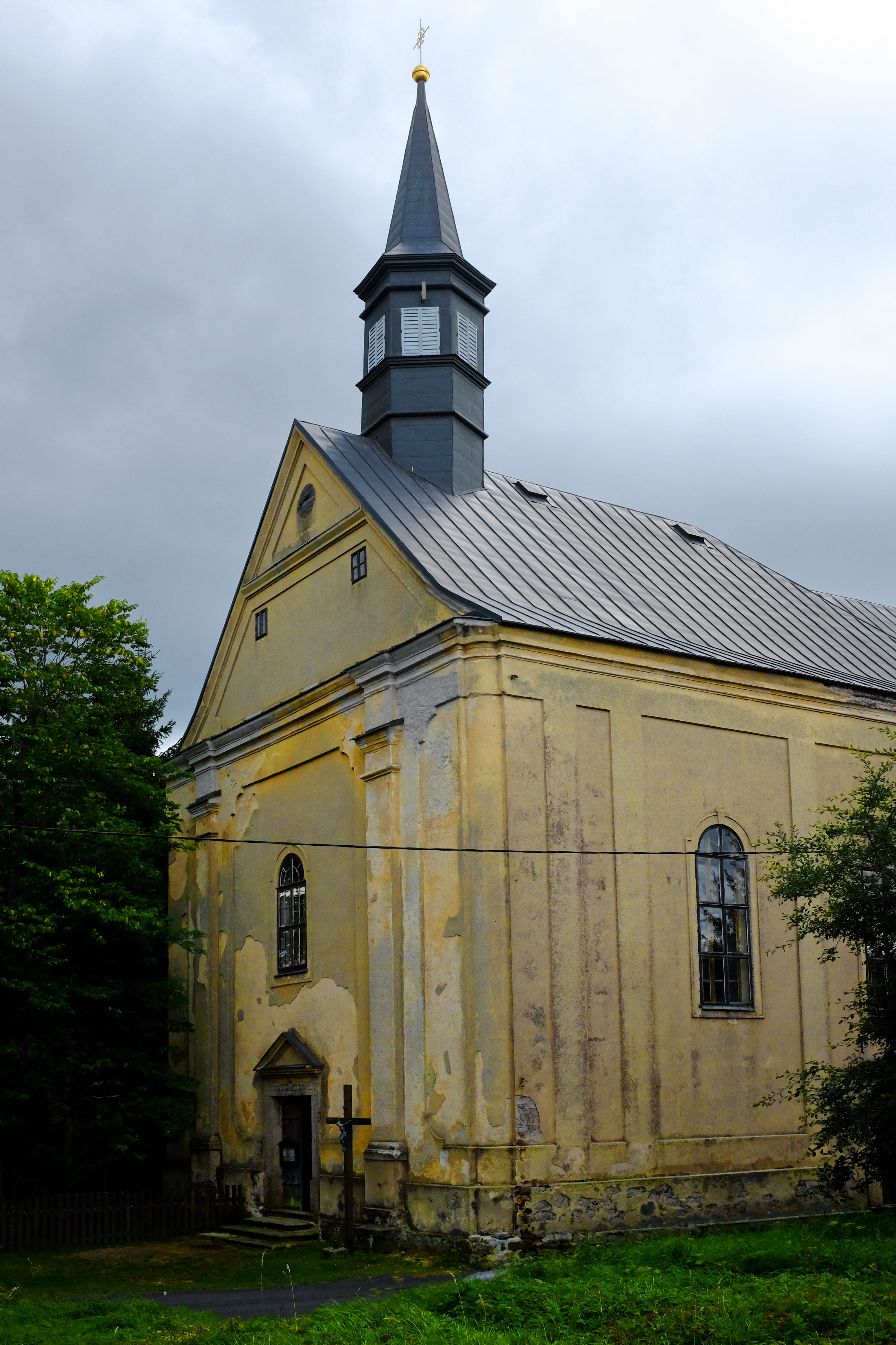 Kostel svatého Bartoloměje, Přebuz.